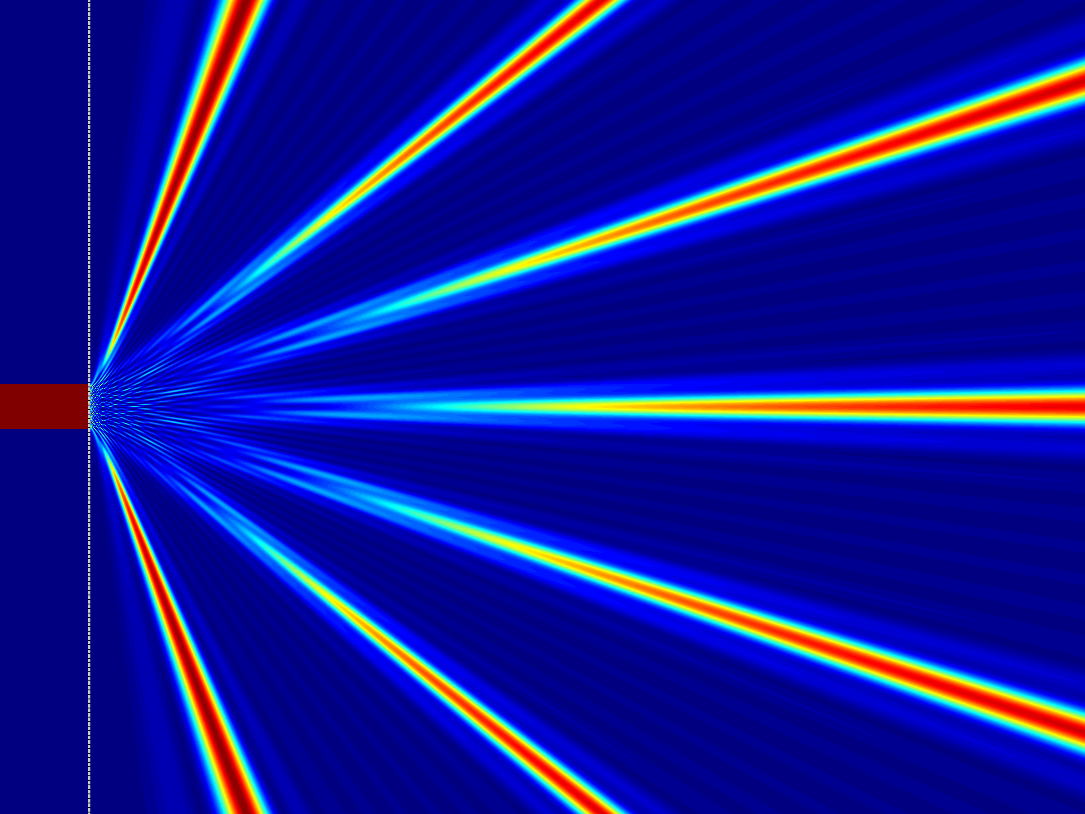 Numerisch berechnete Intensitätsverteilung hinter einem Mehrfachspalt dargestellt als Hitzefeld. Nicht berücksichtigt wurde die Freiraumdämpfung. Deutlich zu erkennen die Hauptmaximas und dazu schwach die Nebenmaximas. Hier wurde zur weiteren Veranschaulichung kein endliches Gitter sondern eine Wellenfront mit begrenzter Weite eingezeichnet. In der Nähe des Gitter treten Alias-Effekte auf, die wegen der begrenzten Auflösung entstehen.